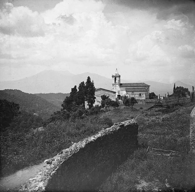 Capella de Montnegre. Josep Salvany i Blanch (1917)